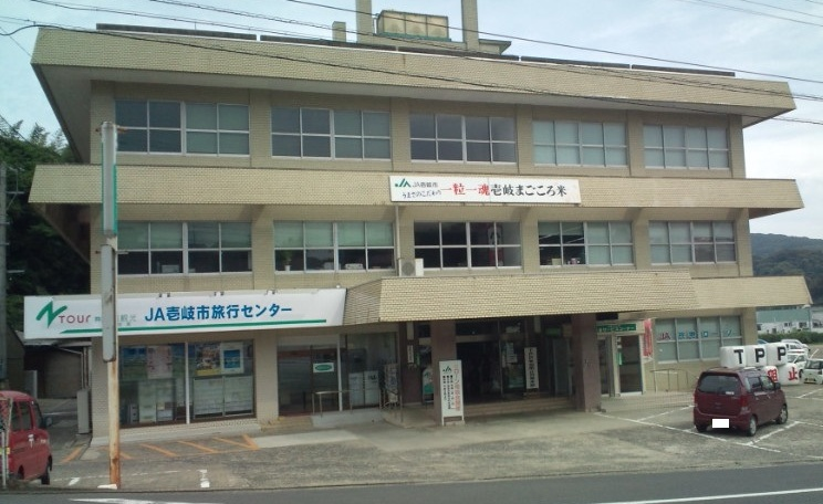 壱岐市農業協同組合 本所